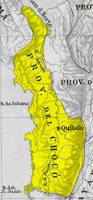 Mapa de la Provincia del Chocó en 1810 y 1830